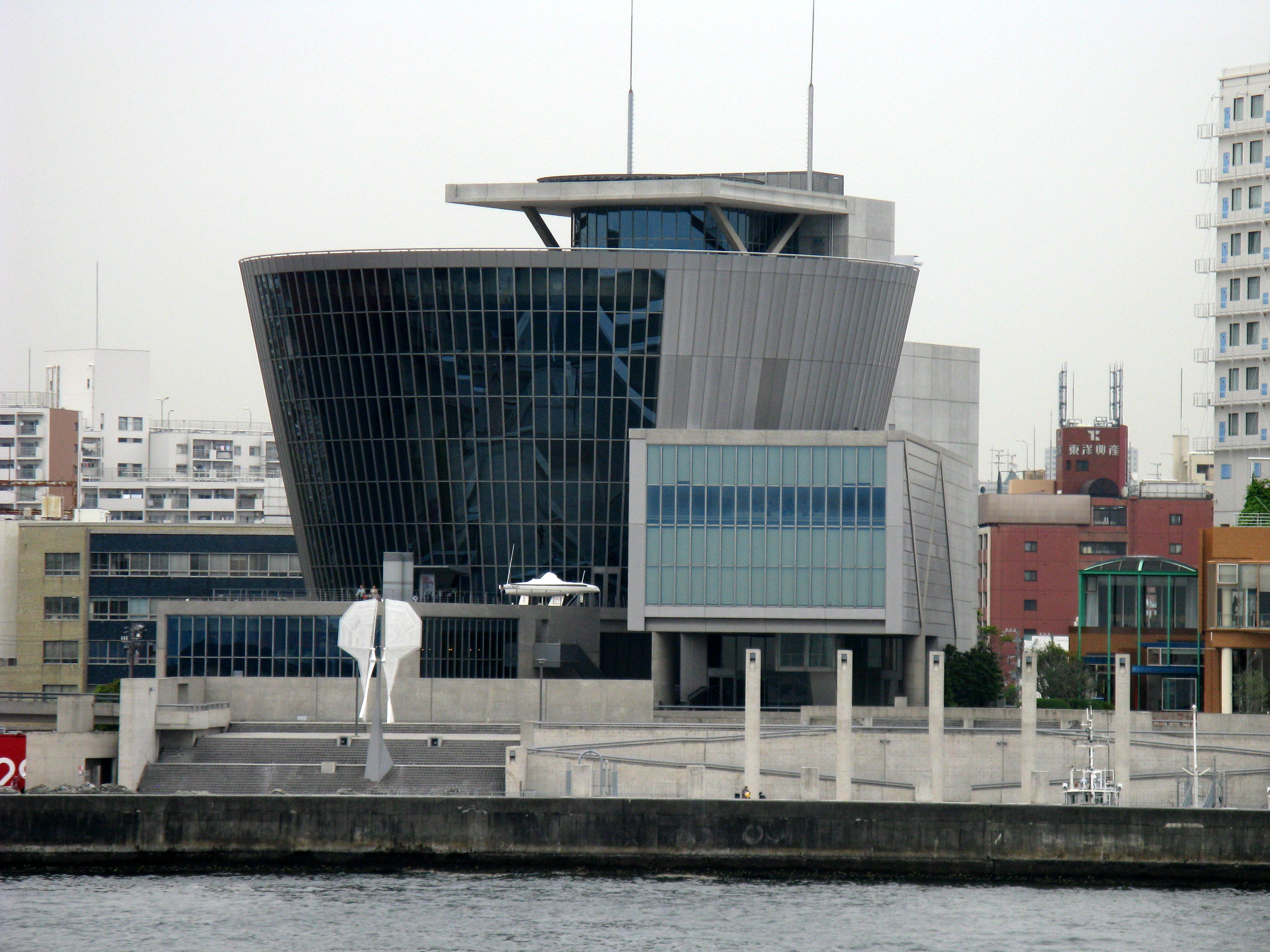 サントリーミュージアム